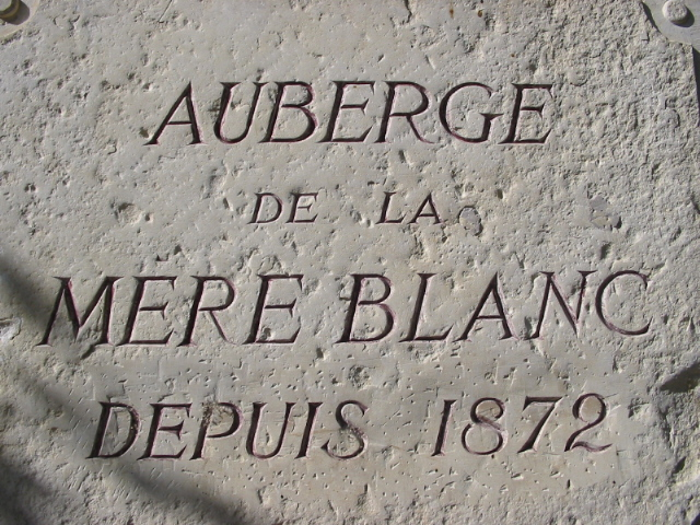 Plaque Auberge de la mere Blanc à Vonnas en Bresse